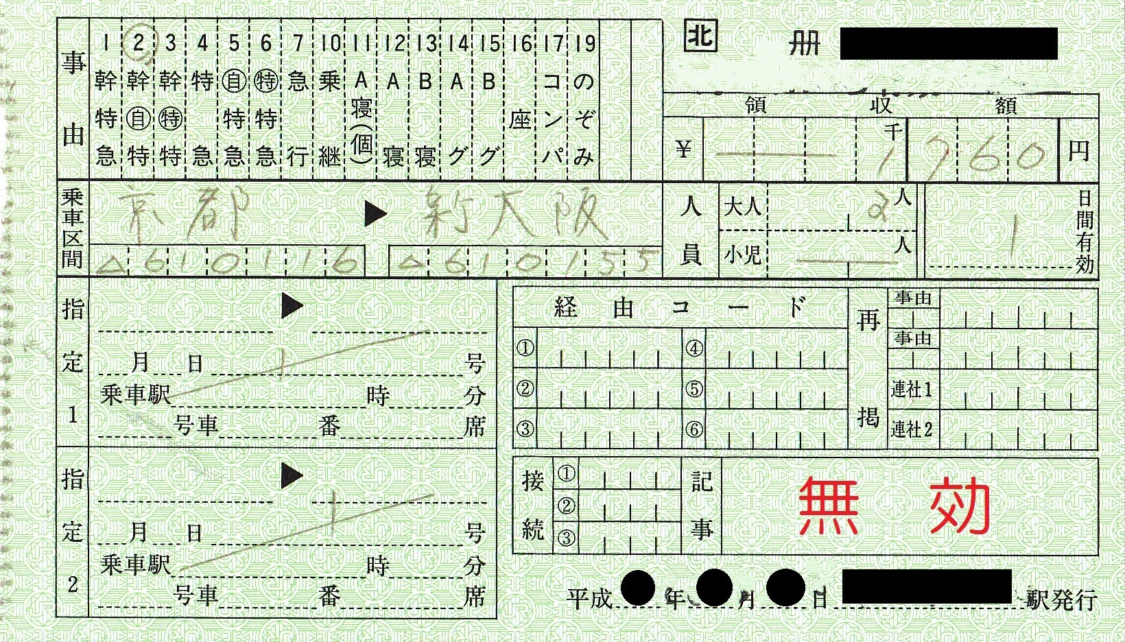 事務管コードが記載された新幹線自由席特急券。画像は一部を加工している。